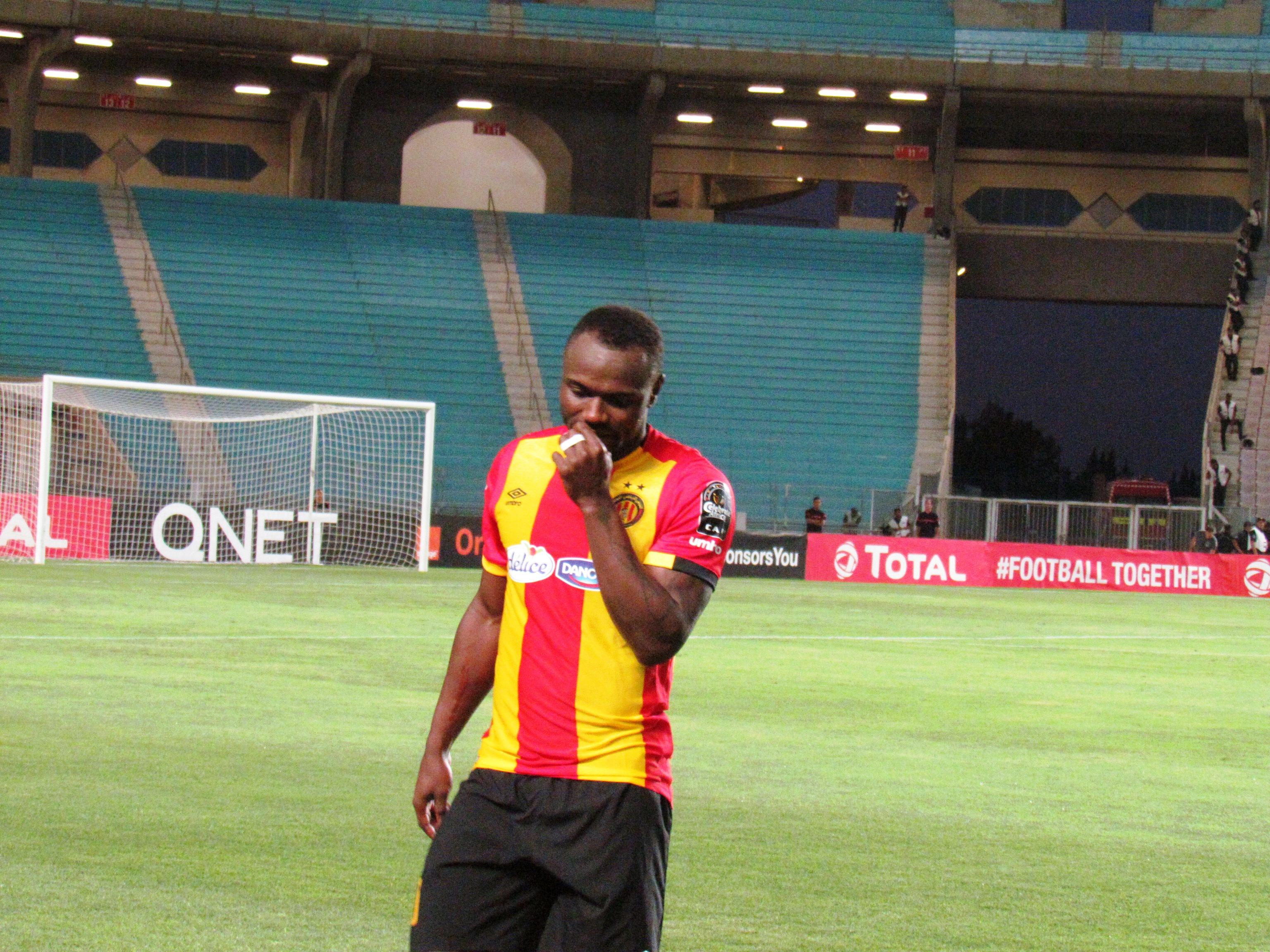 Franck Kom sous les couleurs de l'Espérance sportive de Tunis avant le match de la troisième journée de la Ligue des champions de la CAF entre l'EST et Kampala City (Uganda) le 17 juillet 2018